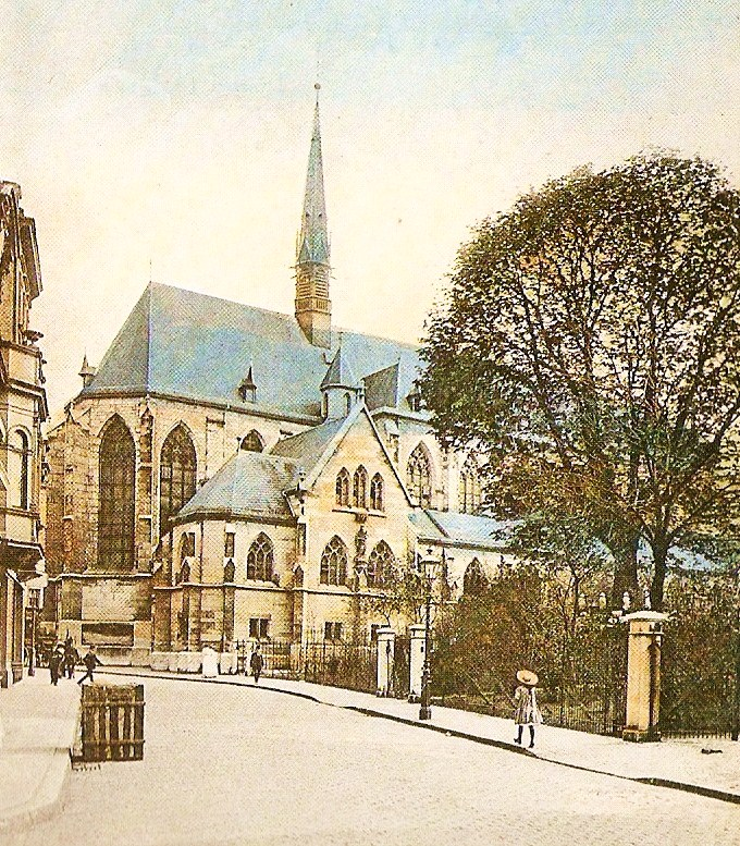 Scan einer alten Postkarte von St. Nikolaus in Aachen zur Jahrhundertwende